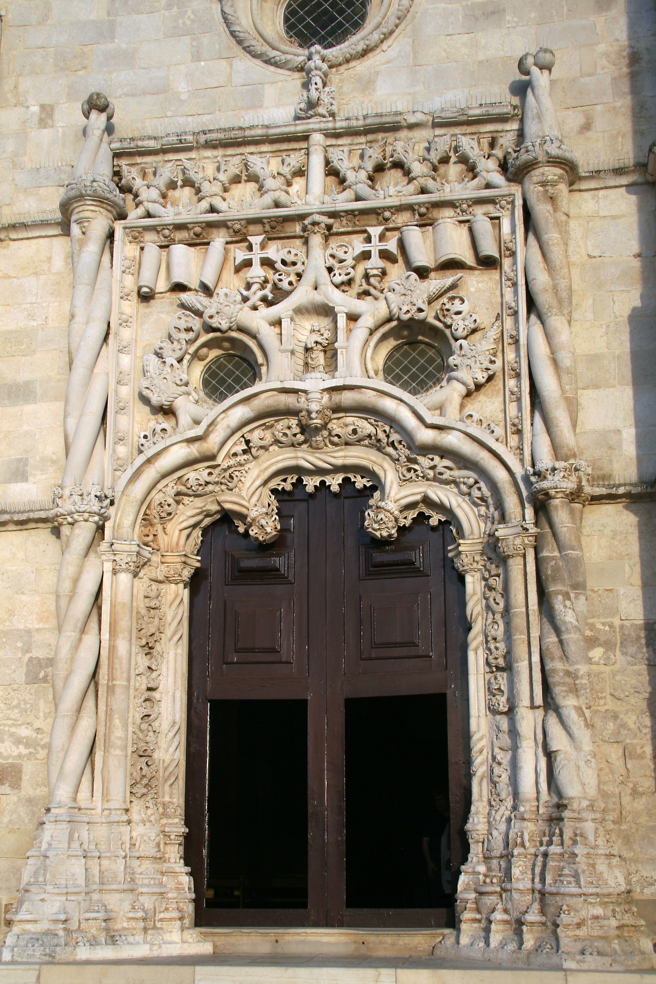 Portal im manuelinischen Stil der Kirche Matriz da Golegã in Golegã (Portugal)